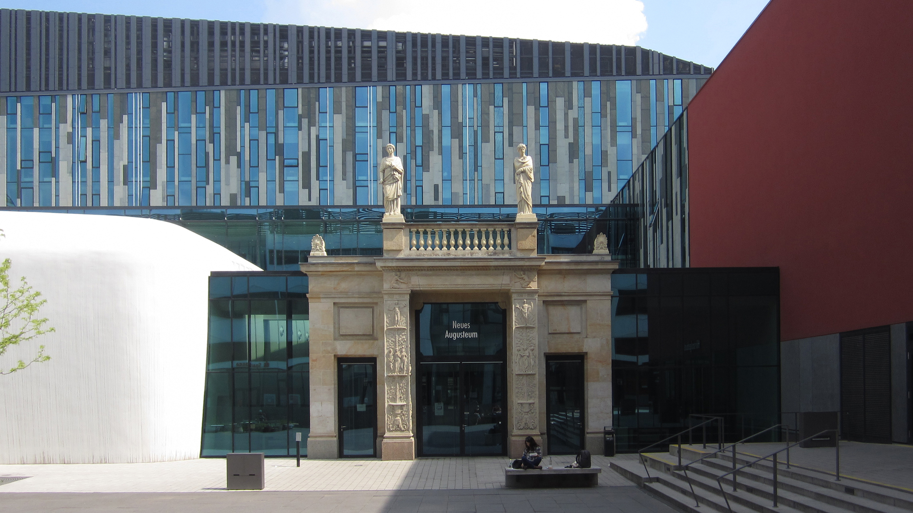 Das klassizistische Schinkeltor von Karl Friedrich Schinkel, das frühere Eingangsportal und heutiger Innenhofzugang zum Neuen Augusteum der Universität Leipzig vom Leibnizforum aus im April 2014.